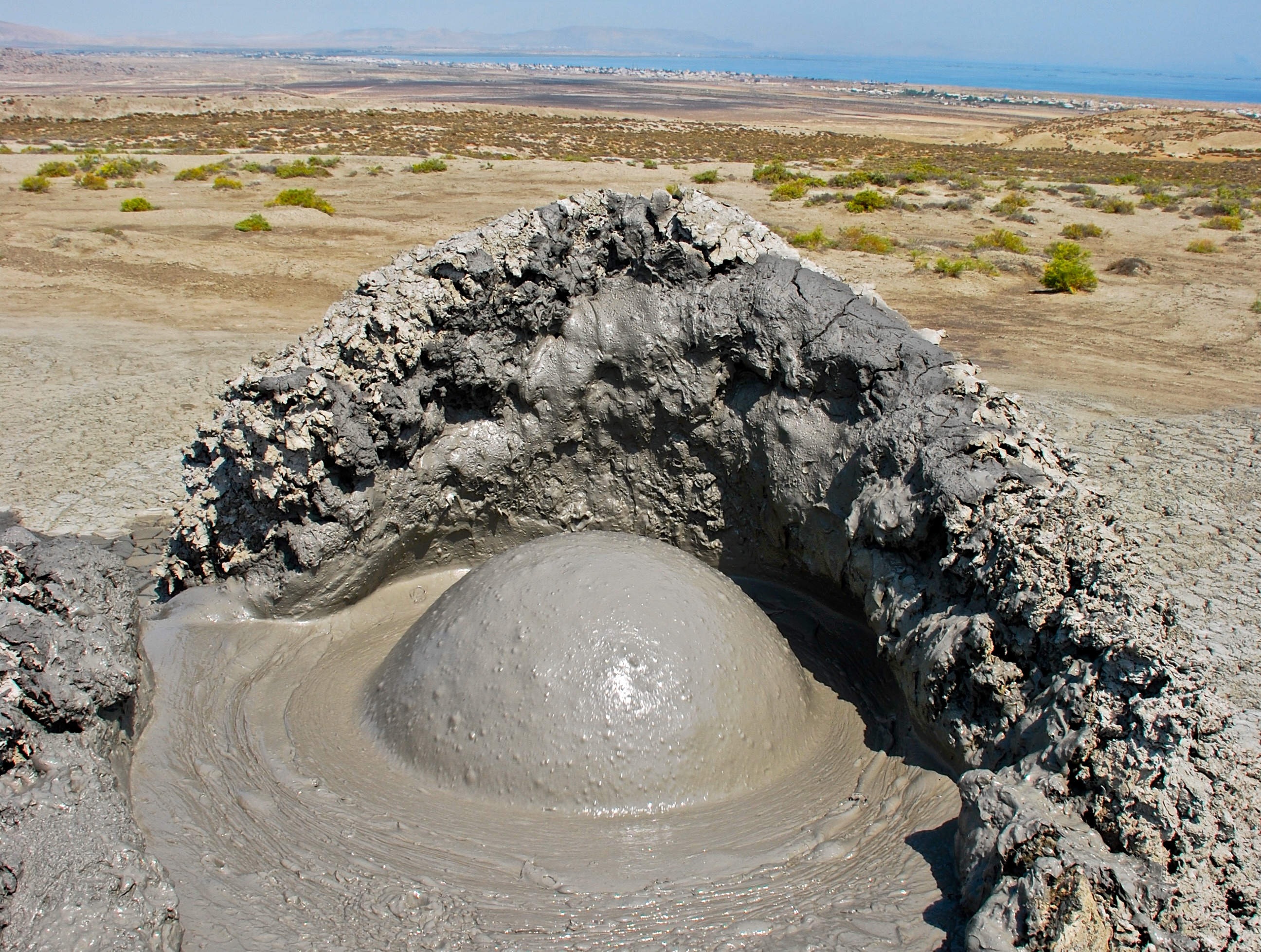 Mud volcanoes of Azerbaijan 2